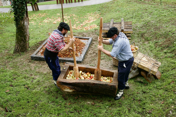 Sagarrak zanpatzen.